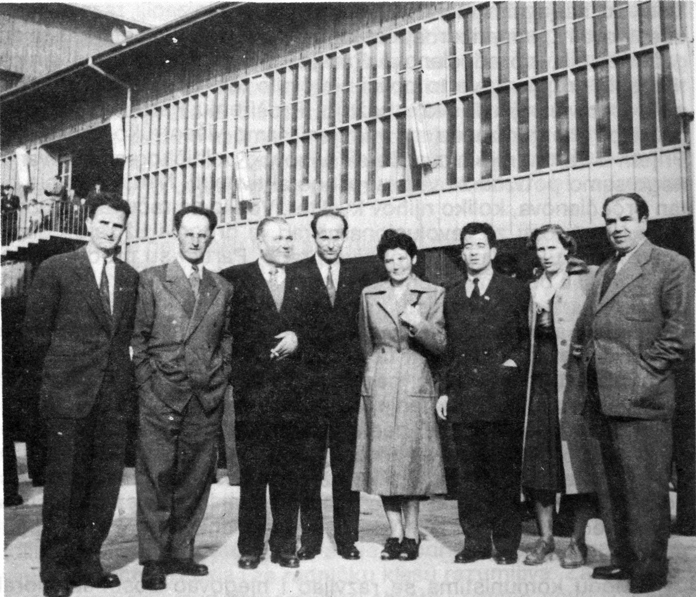 Đuro Đurašković, Hasan Brkić, Arso Jovanović, Dane Olbina, Latinka Perović, Nisim Albahari, Jovanka Cović i Mladen Knežević na Šestom kongresu KPJ u Zagrebu